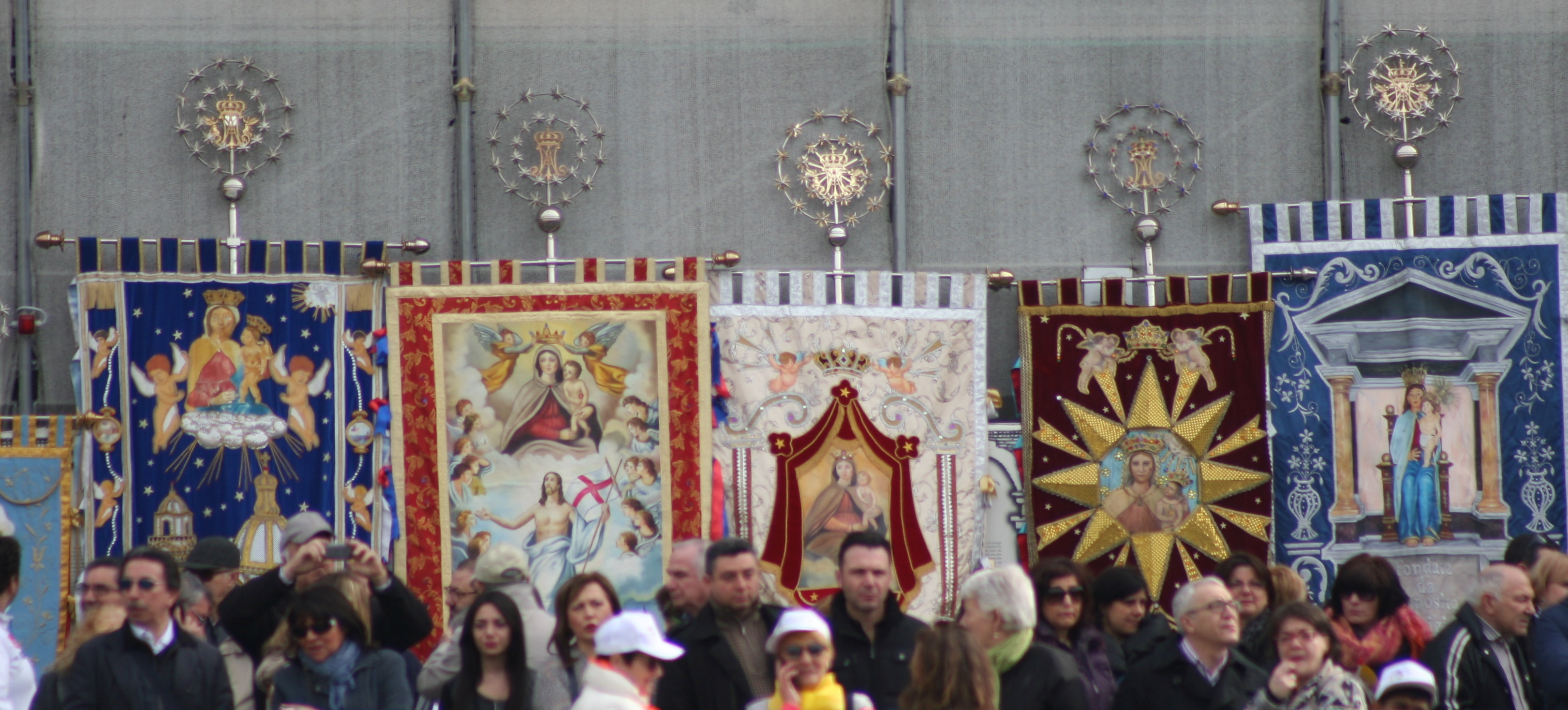 Visite du pape François à Naples le 21 mars 2015